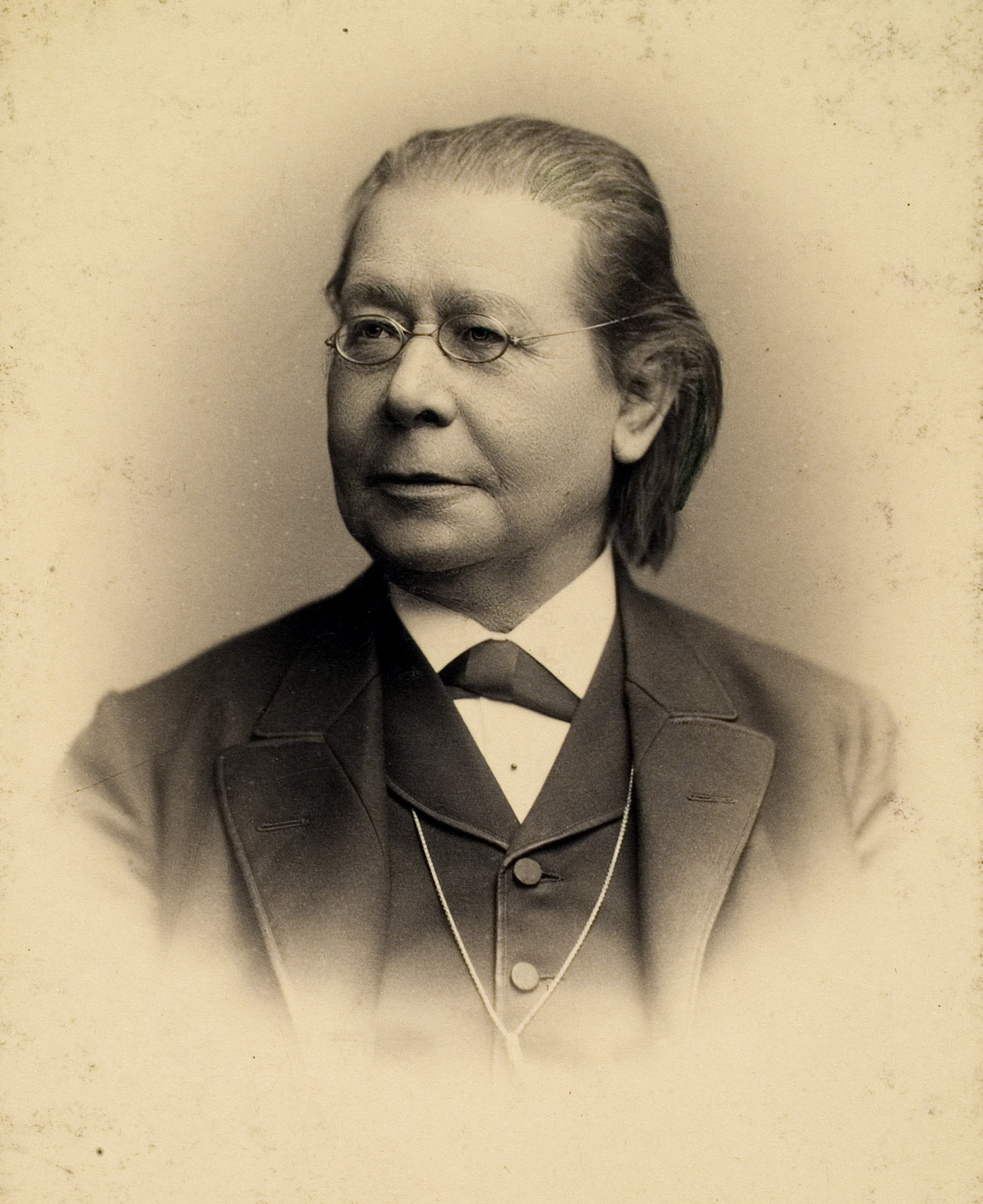 Hermann Franz Moriz Kopp, Chemiker, 1863–1890 Professor in Heidelberg